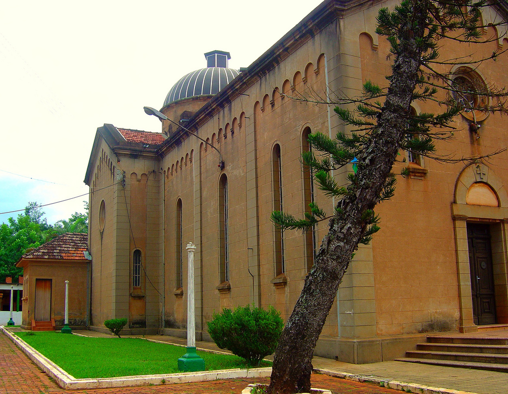 Igreja de Monte Alegre, decorada por Alfredo Volpi (1896-1988)